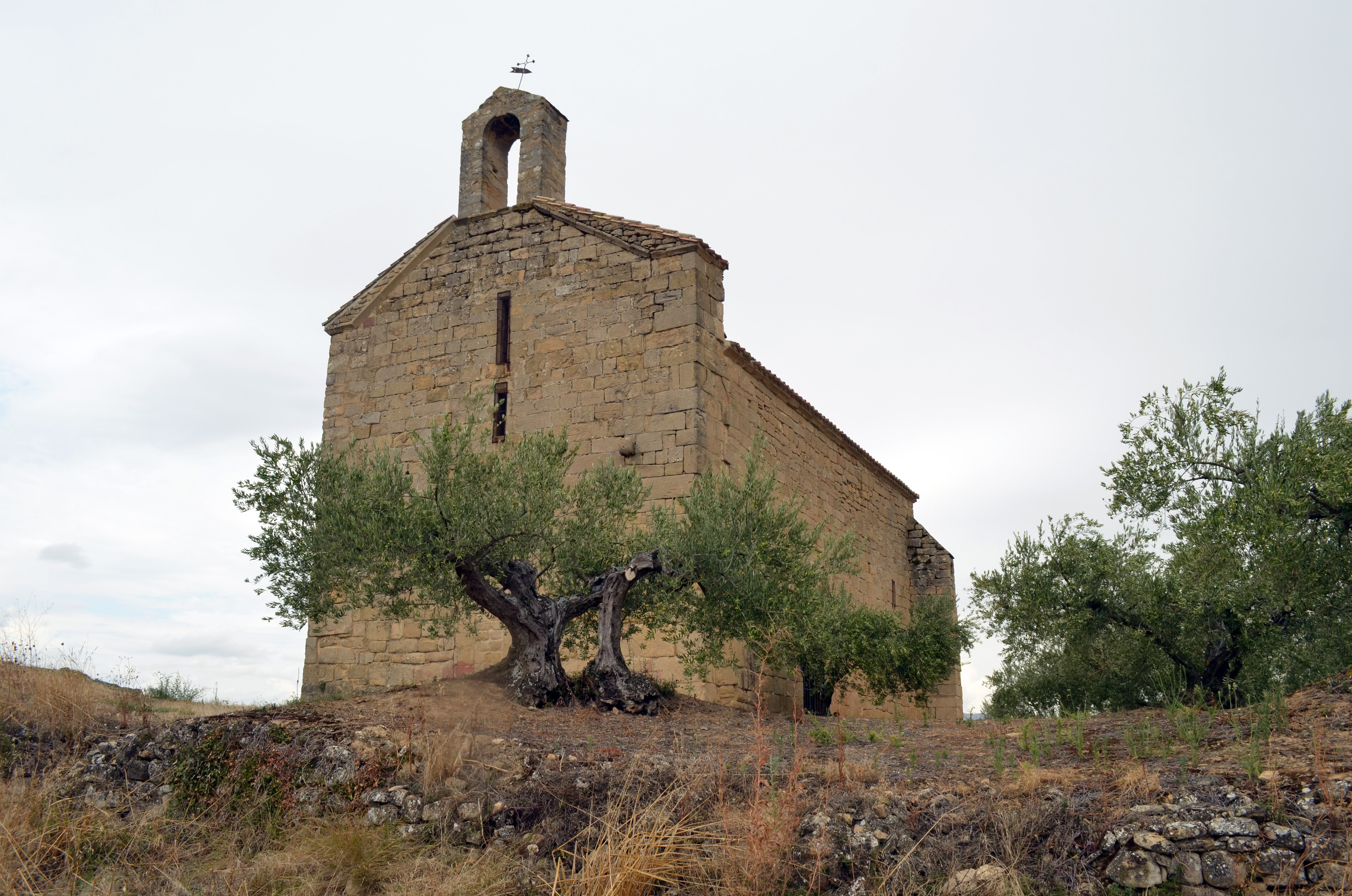 Ermita de San Miguel Arcángel (Villatuerta, Navarra), del siglo X.